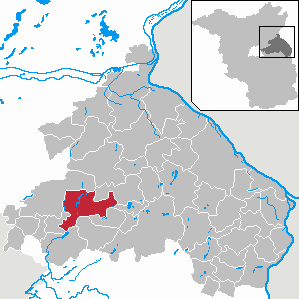 Strausberg in Brandenburg (Country) - District Märkisch-Oderland